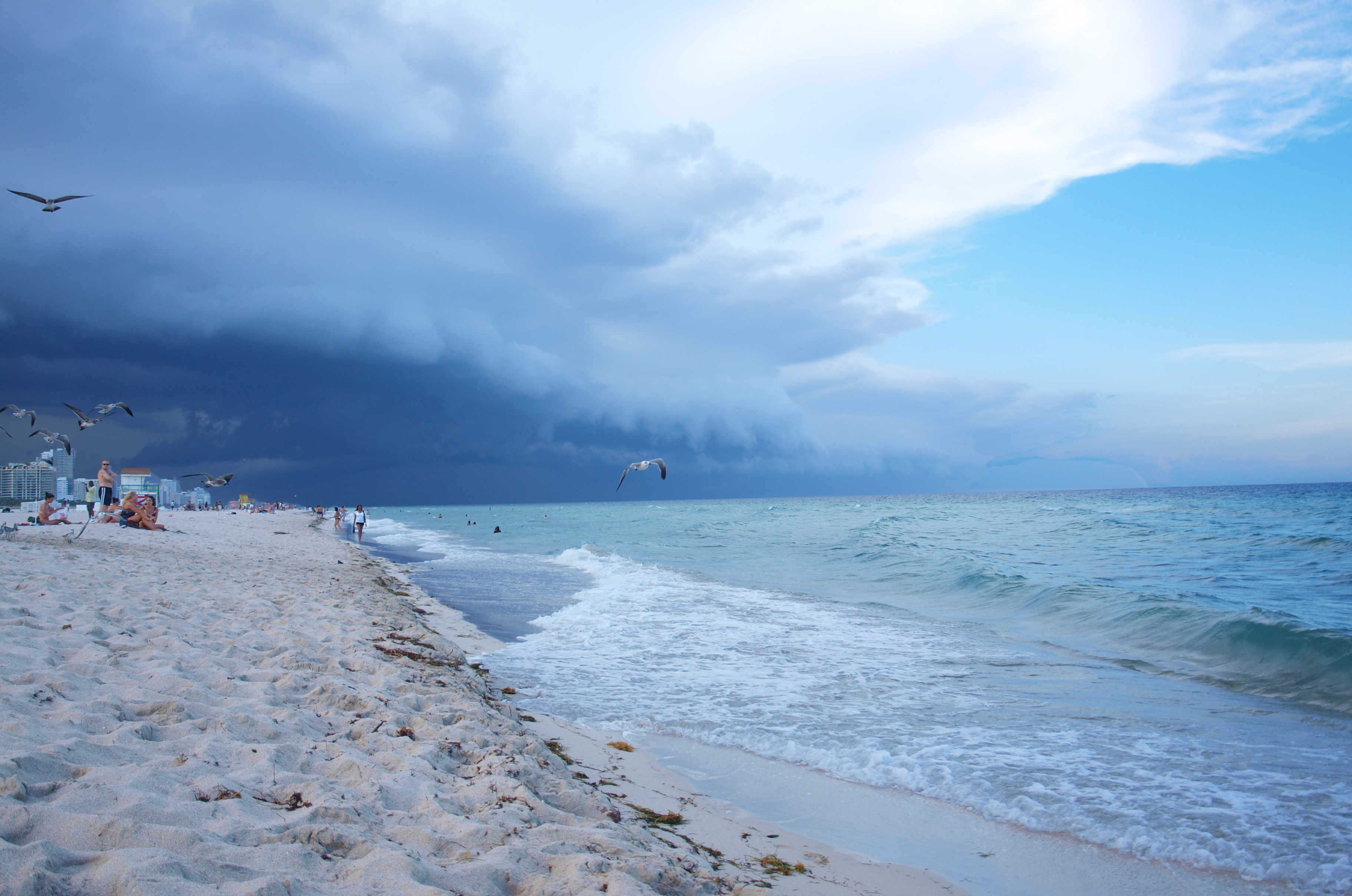 Foto tomada al inicio de un Temporal causado por la cola de una tormenta tropical. South Beach, Miami Beach, Miami, Florida. 25°46′27″N 80°11′37″W